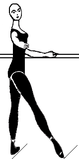 Схематичная иллюстрация выполнения элемента балета в чёрно-белом цветовом исполнении